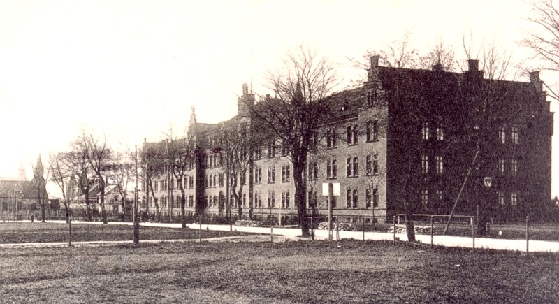 Przygotowawcza Szkoła Podoficerska w Greifenberg/Pommern (Niemcy) - dziś Gryfice (Polska)